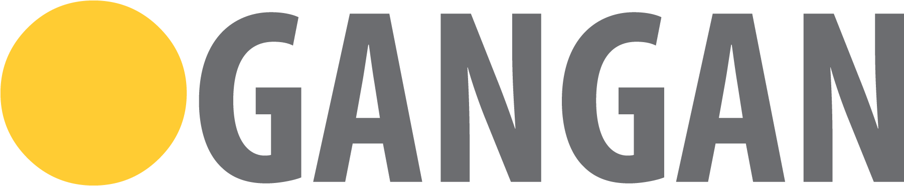 Gangan Verlag Logo